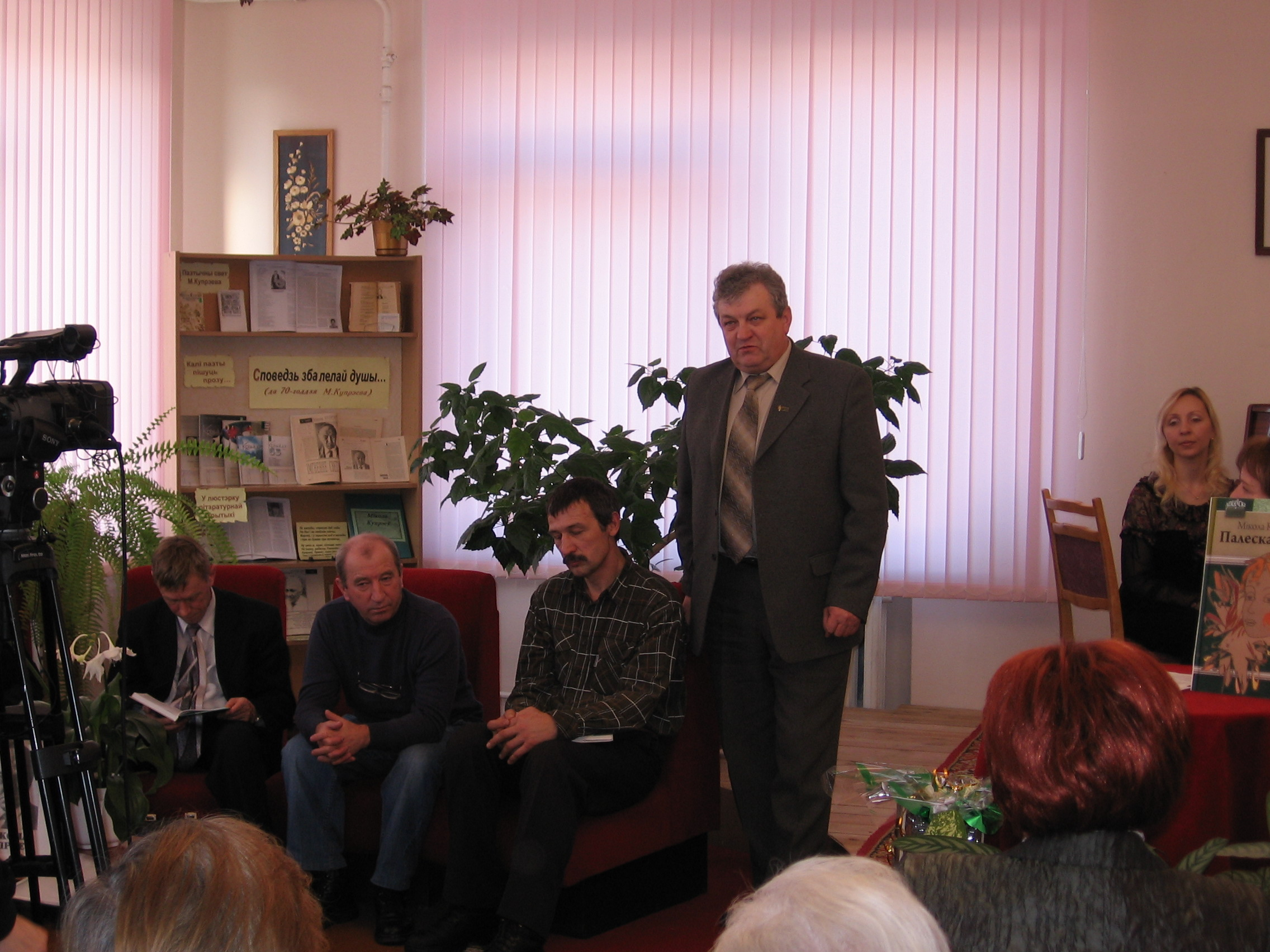 Беларуская (тарашкевіца): На ўручэньні «Мядовай прэміі-2007» у пружанскай раённай бібліятэцы выступае Мікола Антаноўскі